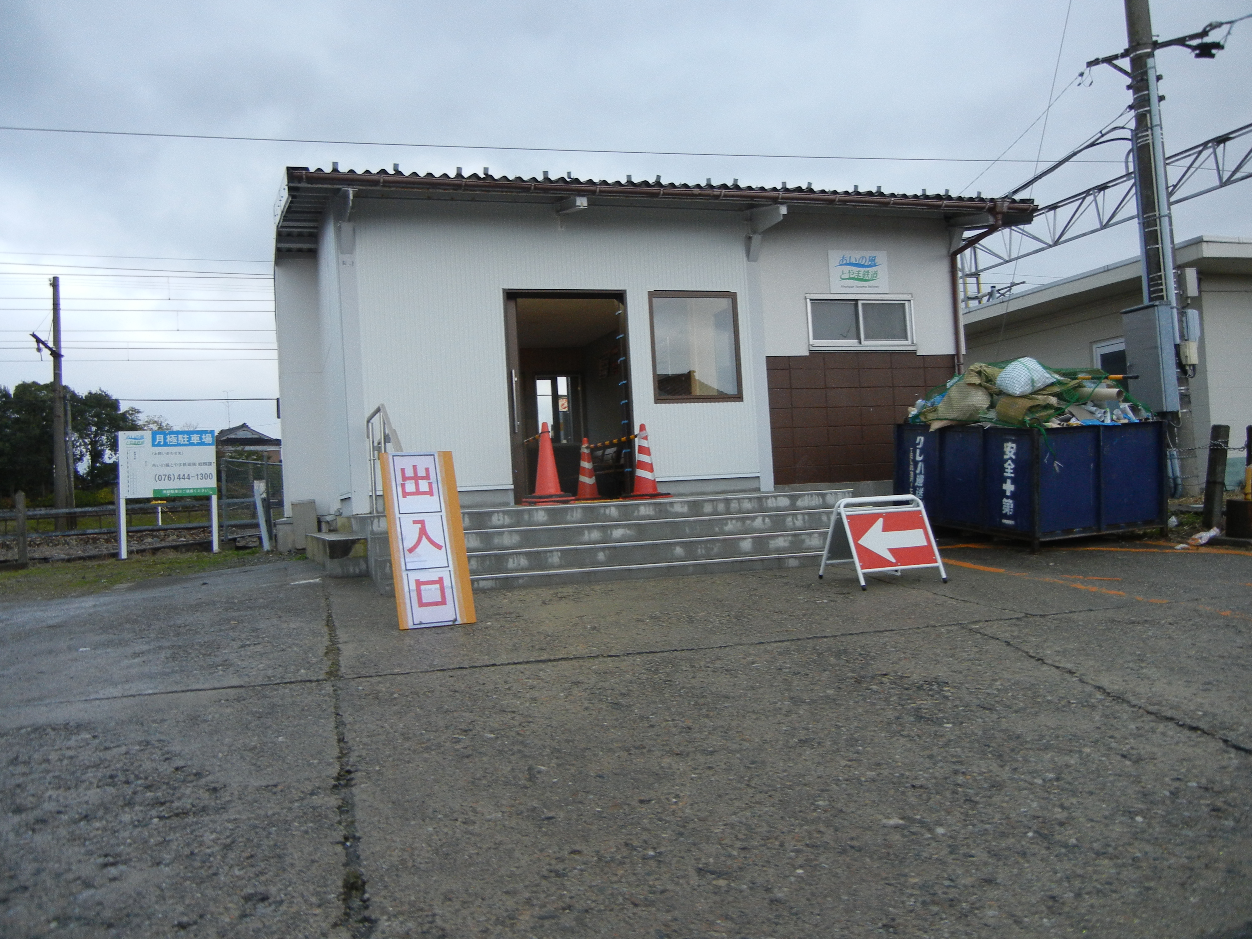 東滑川駅 2018年12月1日時点での仮設駅舎。